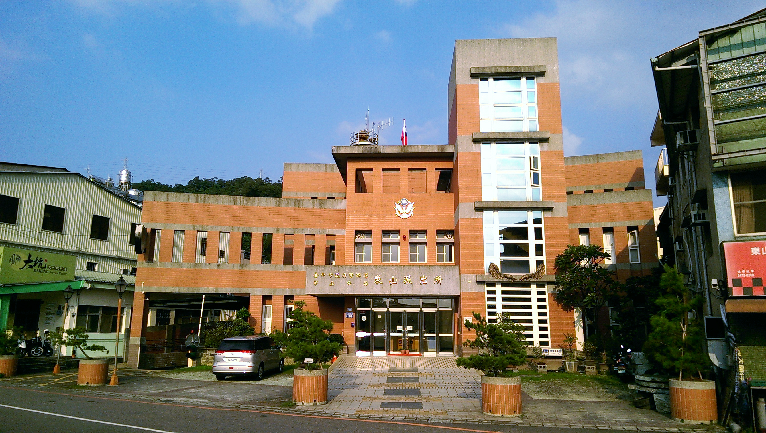 臺中市政府警察局第五分局東山派出所。